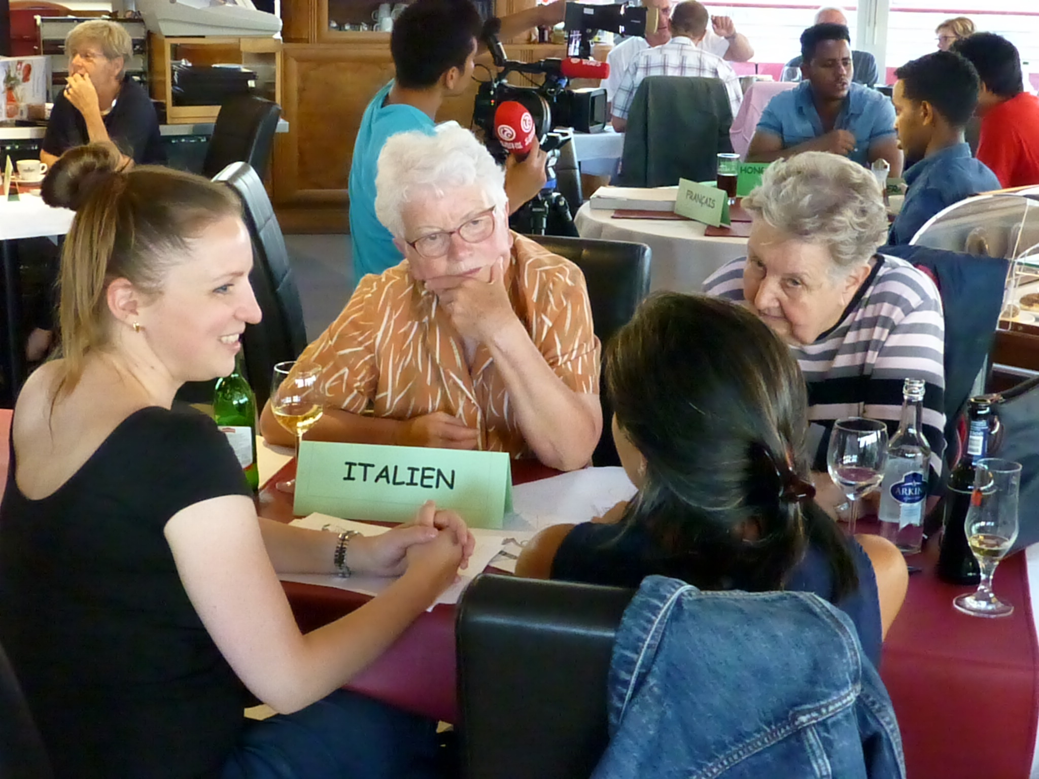 Lingva kafejo en La Chaux-de-Fonds, Svislando